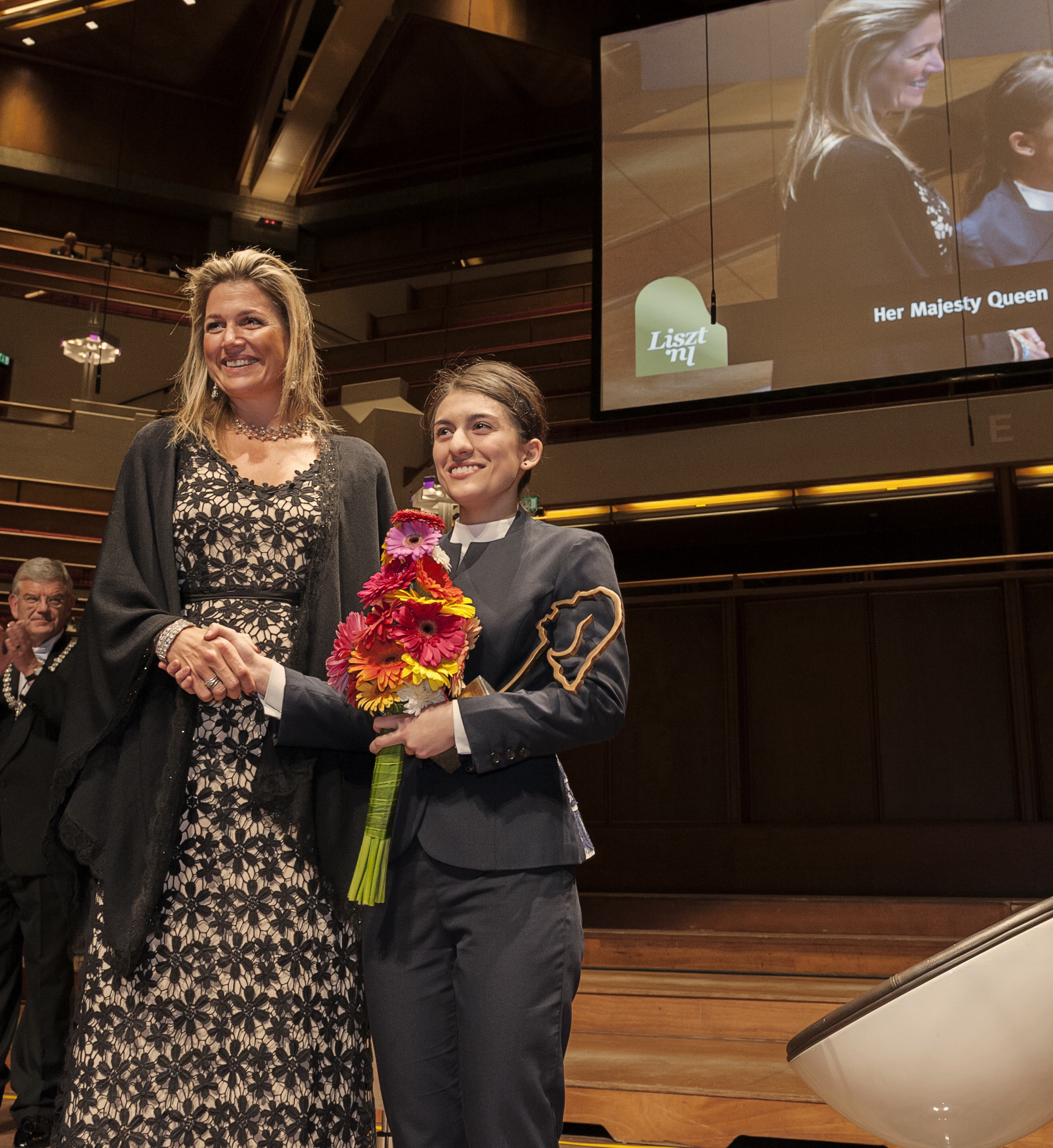 Finale gala-avond Internationaal Franz Liszt Pianoconcours